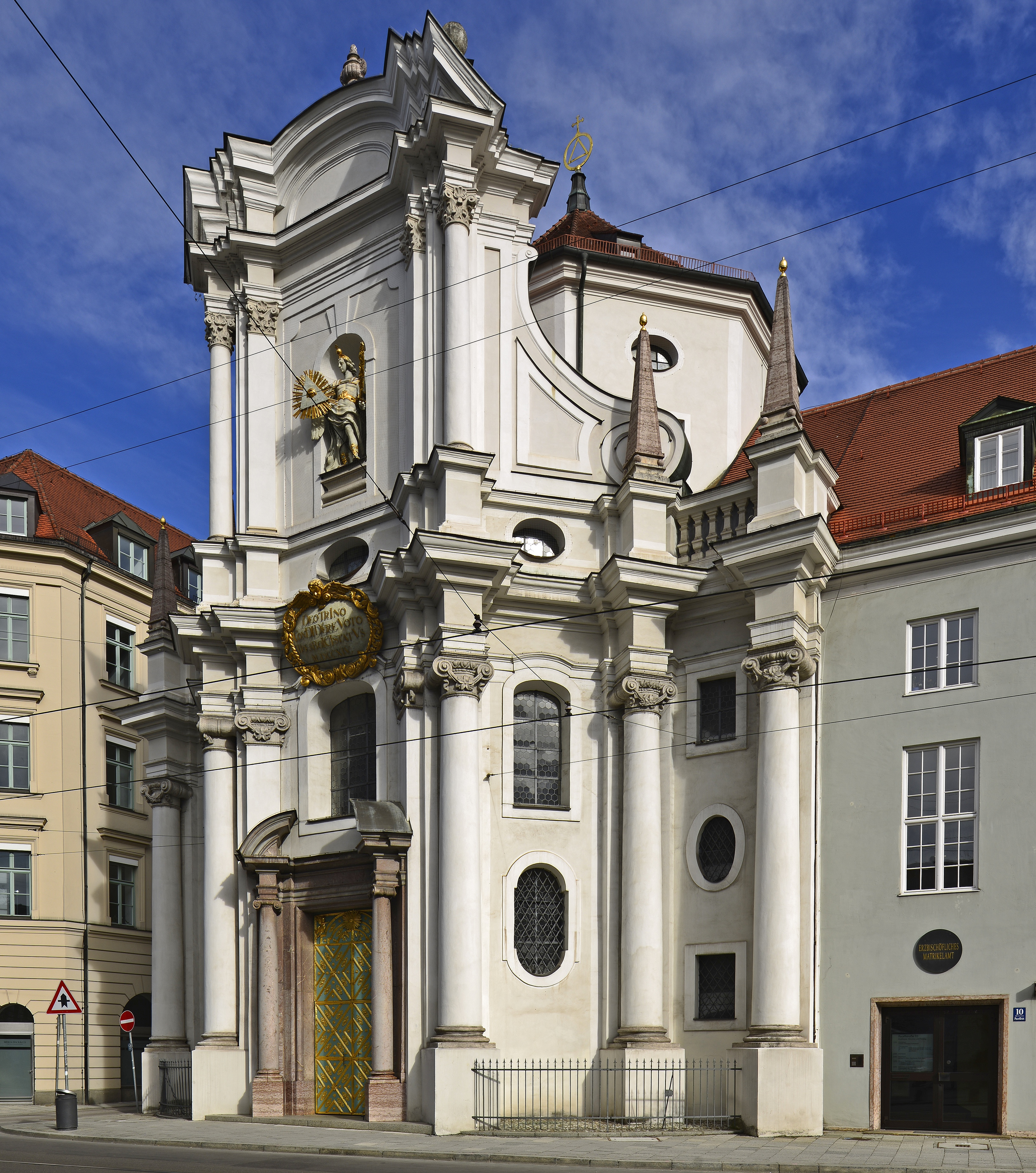 München. Fassadenansicht der Dreifaltigkeitskirche an der Pacellistraße, vormals Pfandhausstraße Nr. 6.